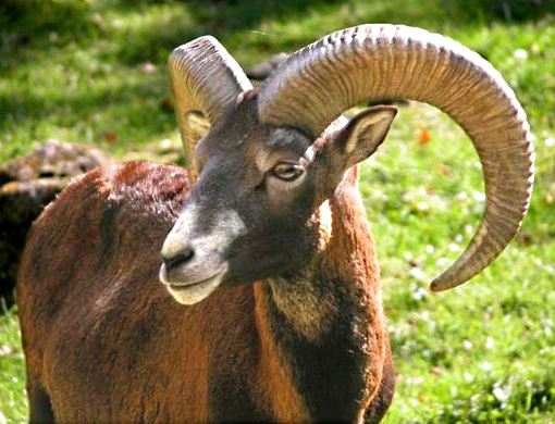 Mufflon (Ovis musimon)